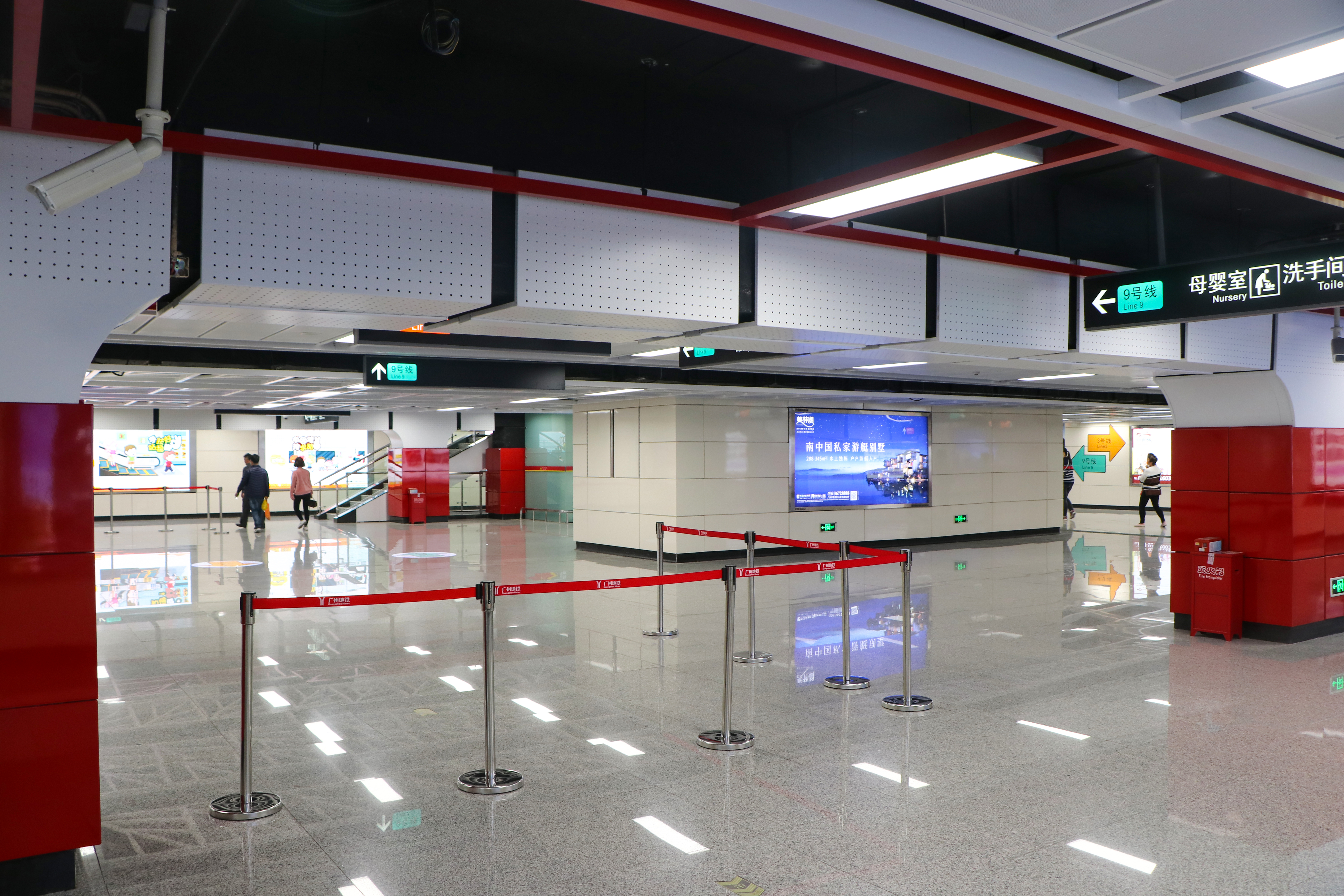 广州地铁高增站